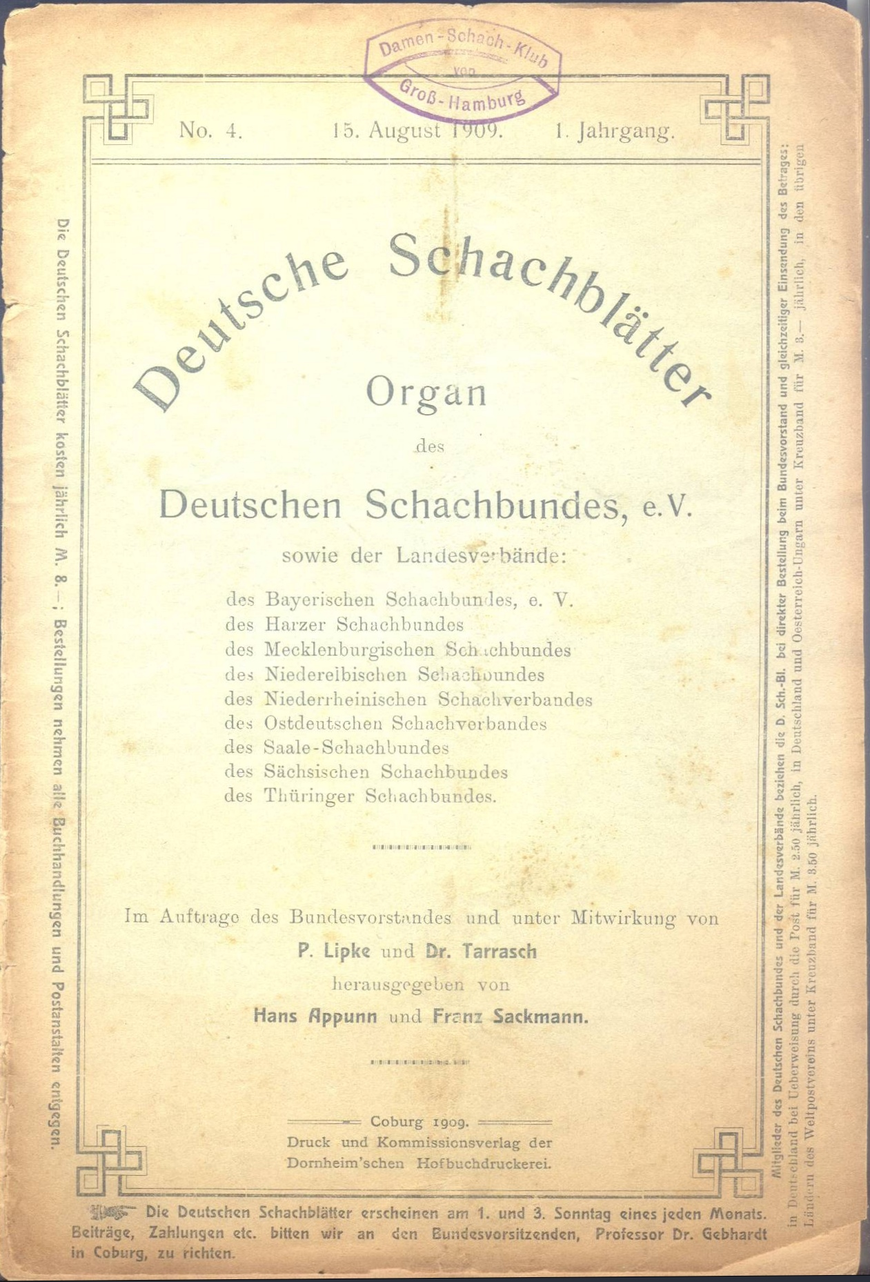 Titelblatt der Nr.4 des 1. Jahrganges 1909 der Deutschen Schachblätter